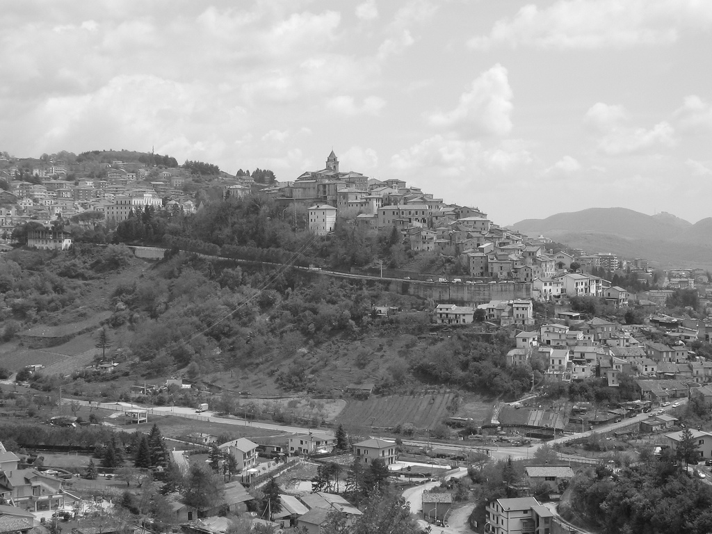 fiuggi, Lazio, Italia